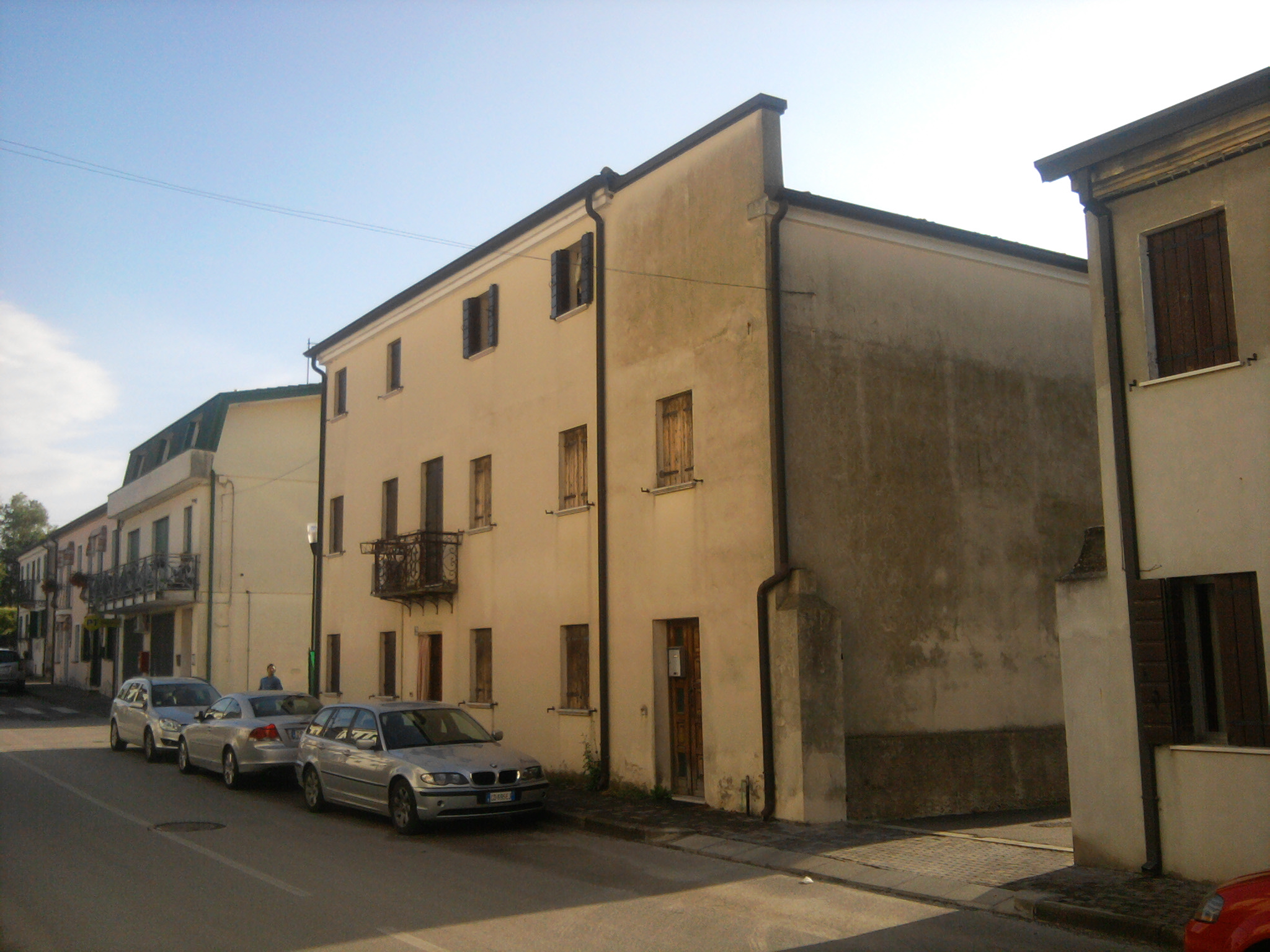 Rottanova, frazione di Cavarzere: la casa natale di Antonio Mattiazzo, attuale arcivescovo della diocesi di Padova.